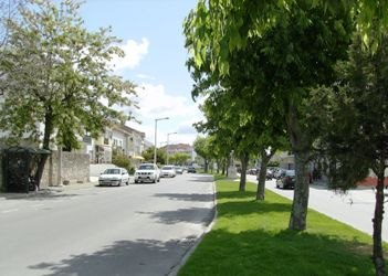 Avenida 12 de Novembro , à entrada da vila de Alcains